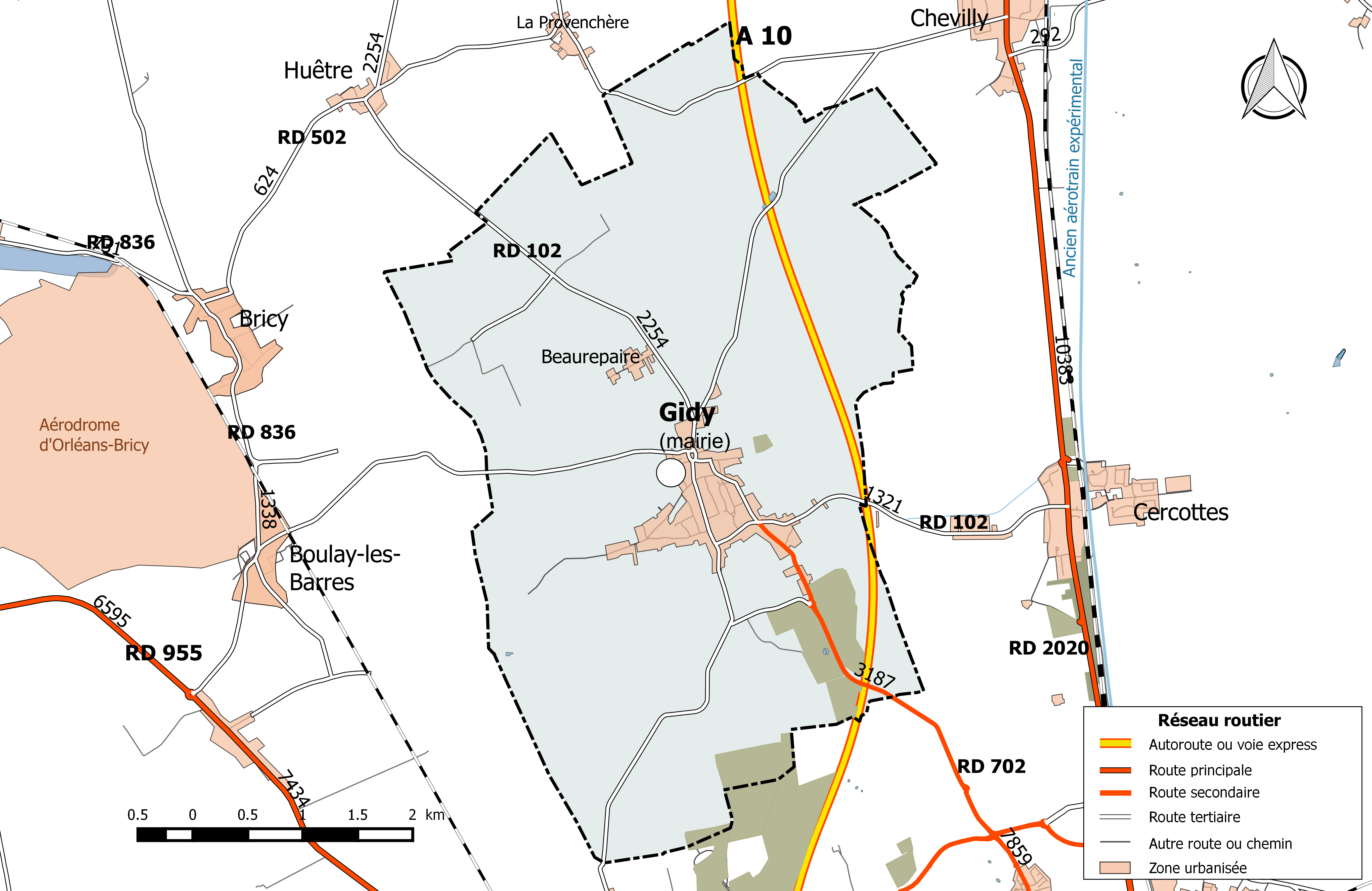 Carte du réseau routier de la commune de Gidy.